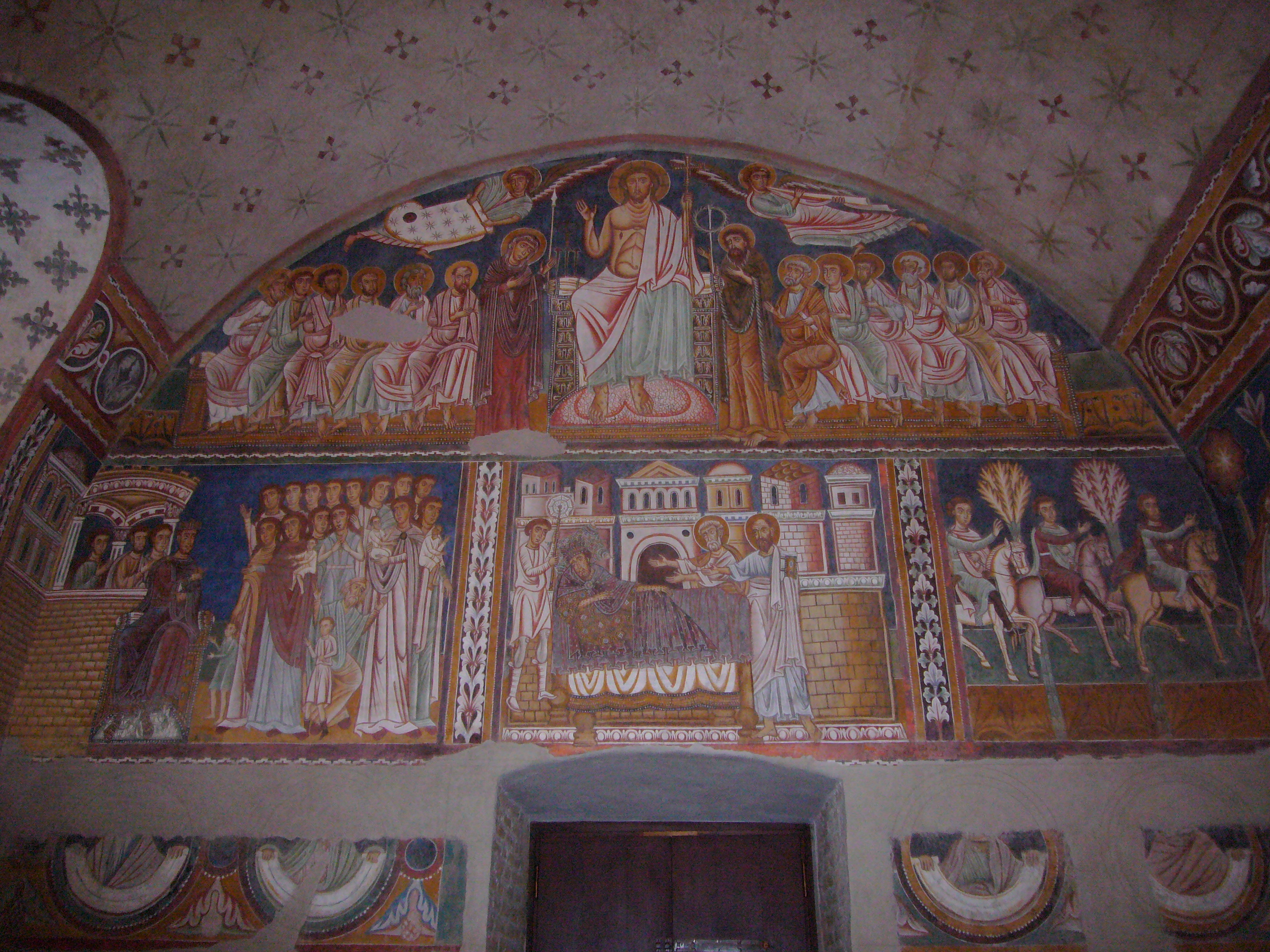 Roma, Santi Quattro Coronati: oratorio di S. Silvestro - storie di Costantino e Silvestro (XIII sec.)